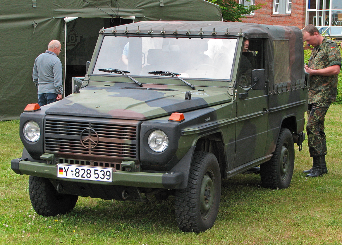 Dieses Bild zeigt einen MB 250 GD kurz, ohne Rüstsatz Funk, links und rechts neben dem Kennzeichen die Tarnscheinwerfer der Bundeswehr.